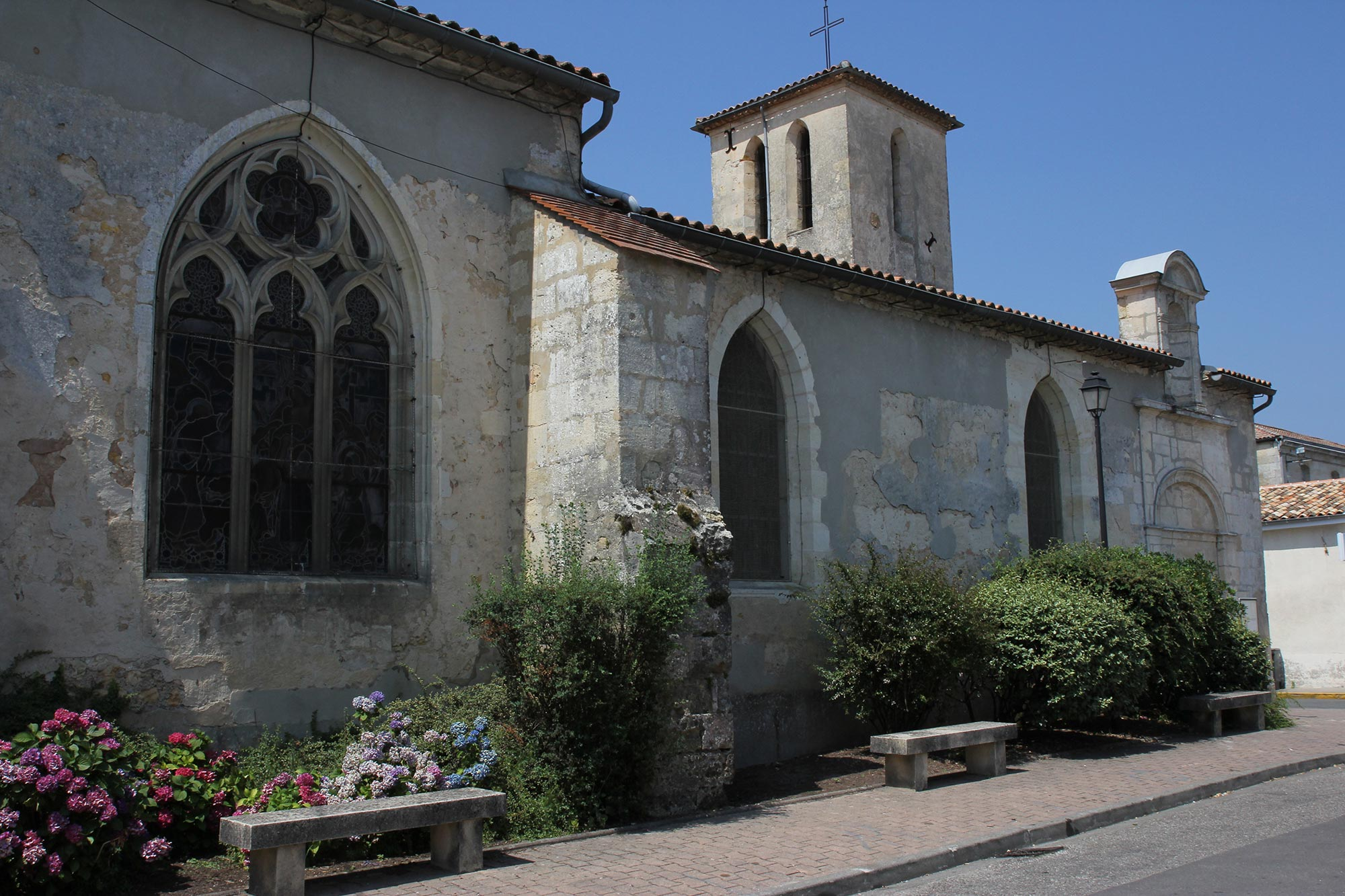 Eglise de Castelnau